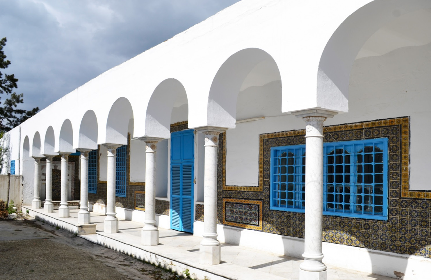 Actuelle façade Sud du Château de Mégrine telle que modifiée par le comte Foy dans les années 1920